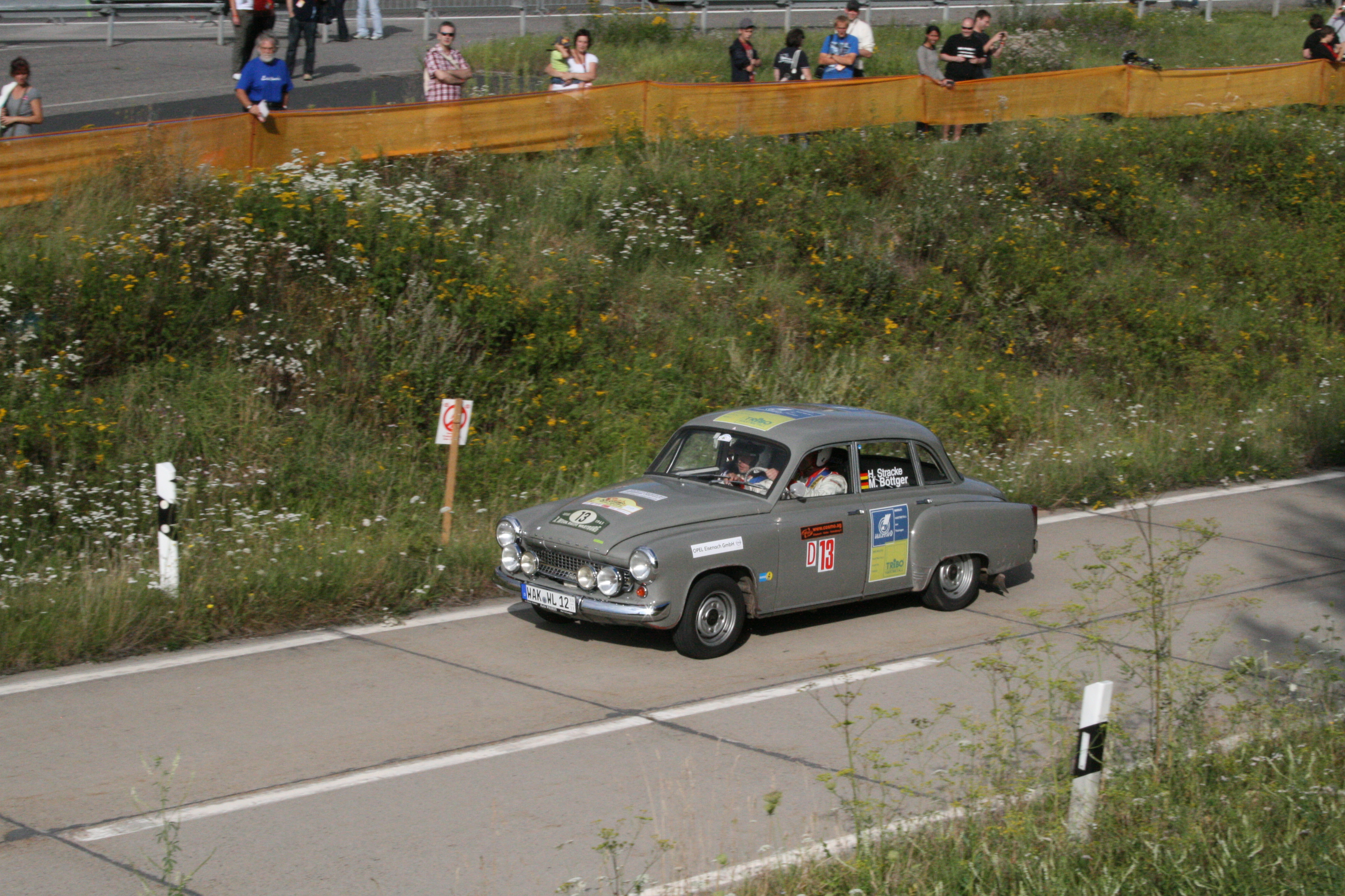 Wartburg 312 Rallye bei einem Rennen historischer Fahrzeuge